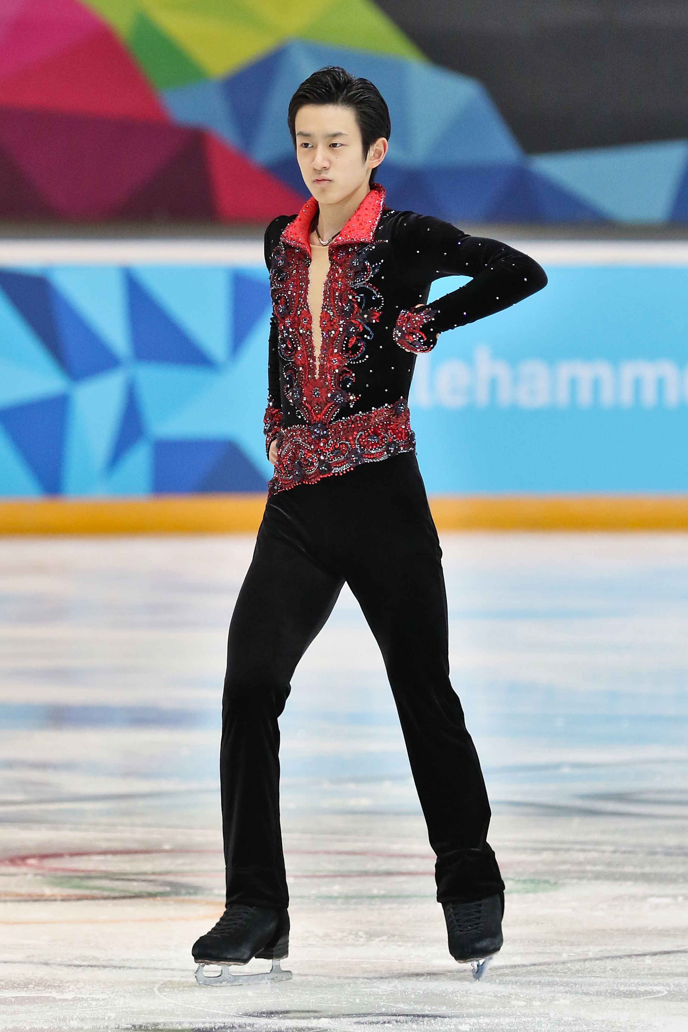 Lillehammer 2016 - Figure Skating Men Short Program - Sota Yamamoto